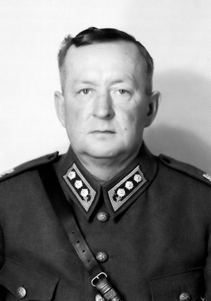 Eversti Lauri Tiainen